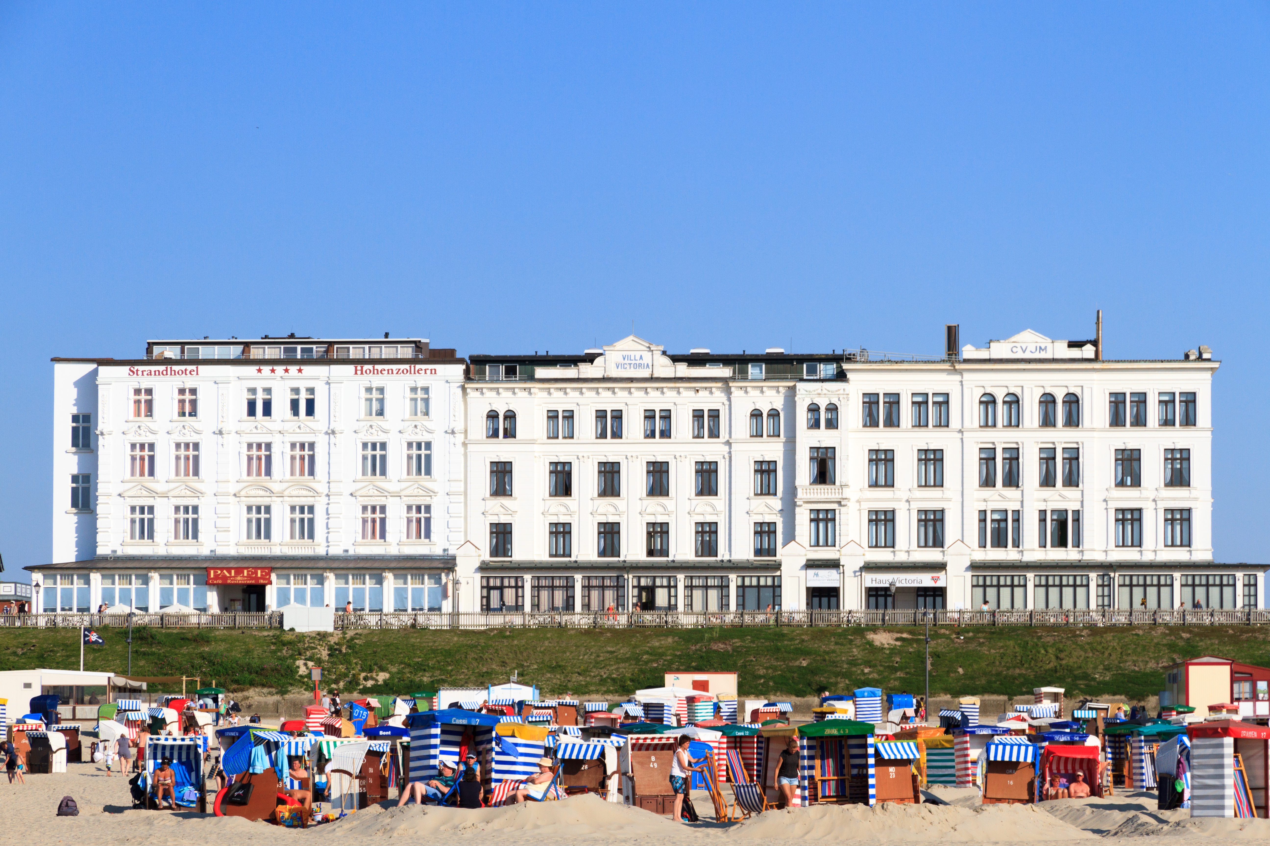 Hauptstrand Borkum